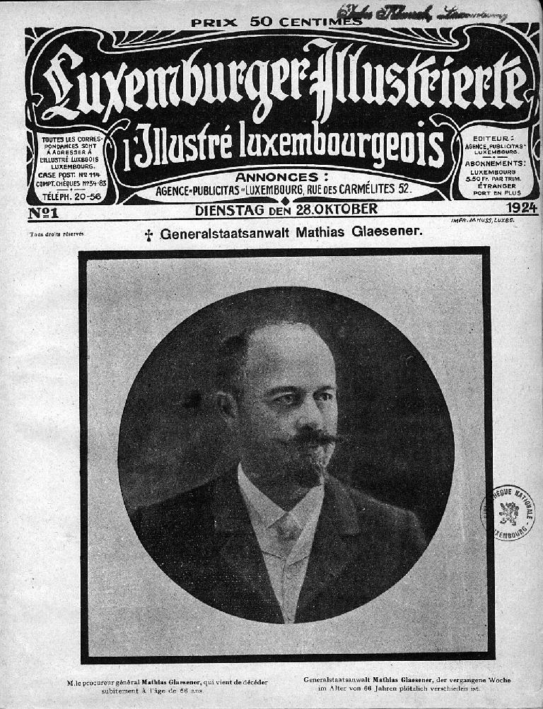 Sujet:Luxemburger Illustrierte, Nr 1/1924 Source:Lëtzebuerger Nationalbibliothéik Lizenz:Creative Commons